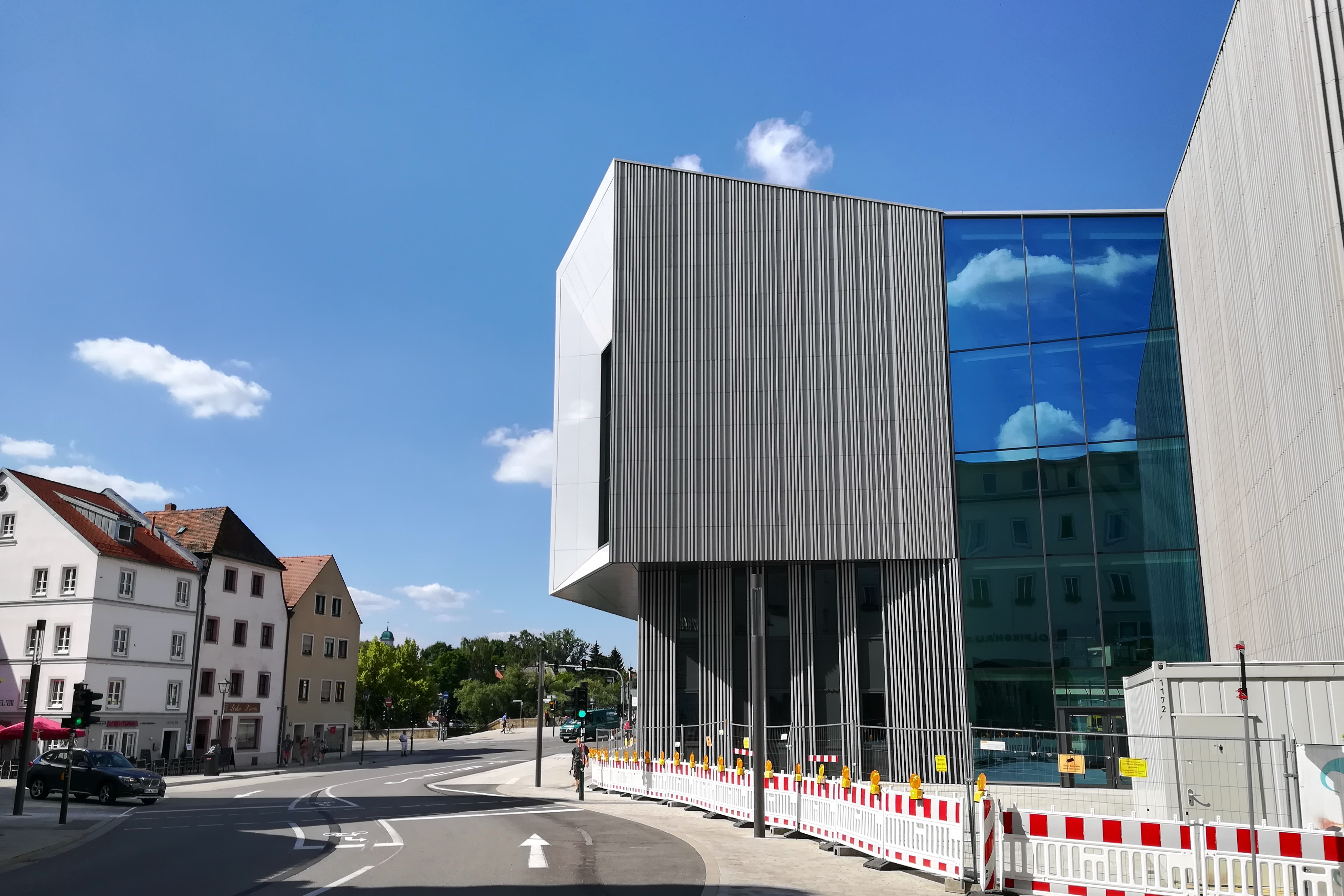 Das Museum der Bayerischen Geschichte (auch Bayerisches Landesmuseum für Geschichte oder Museum für bayerische Geschichte) ist ein entstehendes Museum zur jüngeren bayerischen Geschichte in Regensburg.